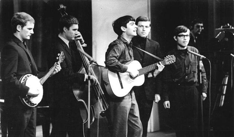 Zentralbild Franke 5.3.1967 "Kommt und singt" Veranstaltung der FDJ in der Berliner Volksbühne "Kommt und singt" war der Titel eines stimmungsvollen Abends mit Berliner Mädchen und Jungen am 4.3.1967 in der überfüllten Volksbühne, dem viele künftige Teilnehmer am Pfingsttreffen im Karl-Marx-Stadt besuchten. Gemeinsam mit den Akteuren auf der Bühne sangen die Jugendfreunde Kampflieder der Arbeiterklasse, Volkslieder, Jugendlieder und Chansons. Auf dem Bild Mitglieder des Berliner "Oktoberclubs" mit Gitarre Hartmut König.